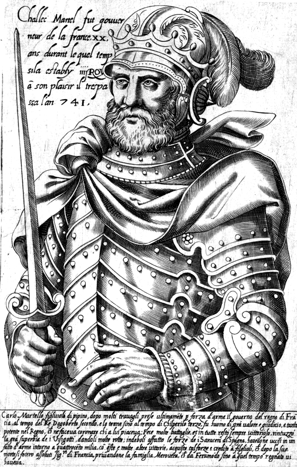 Karl Martell, Majordomus der Franken (um 689 - 741)